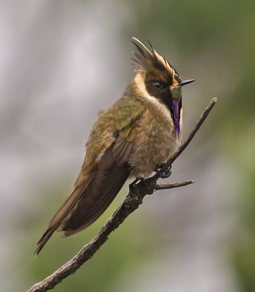 Buffy helmetcrest, Oxypogon stuebeliiEn "Brisas" - Nevado del Ruiz. Manizales.